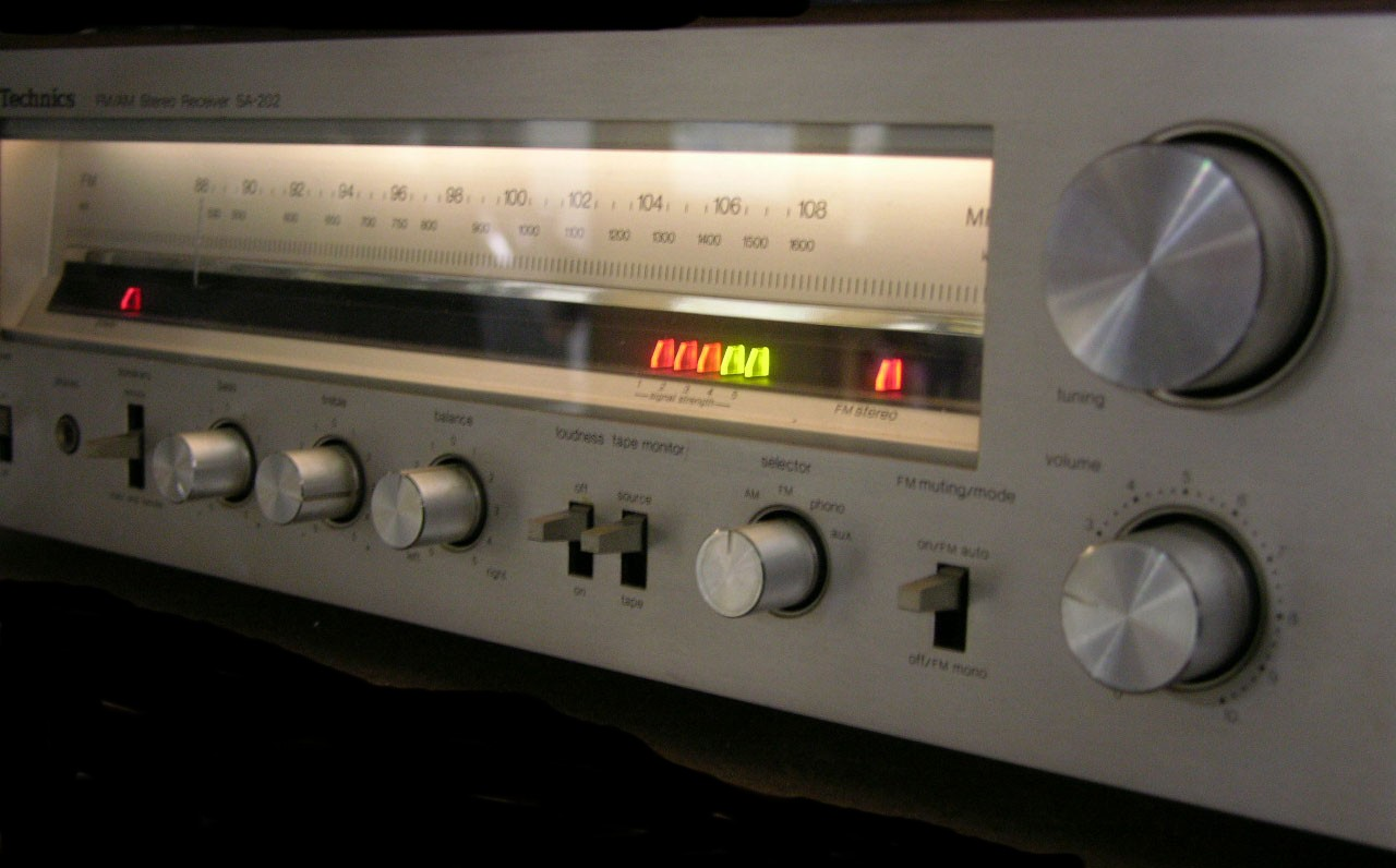 SA-202 Receiver - Circa 1980